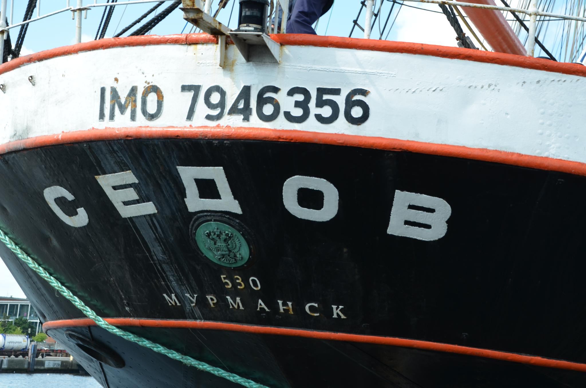 Kieler Woche 2013